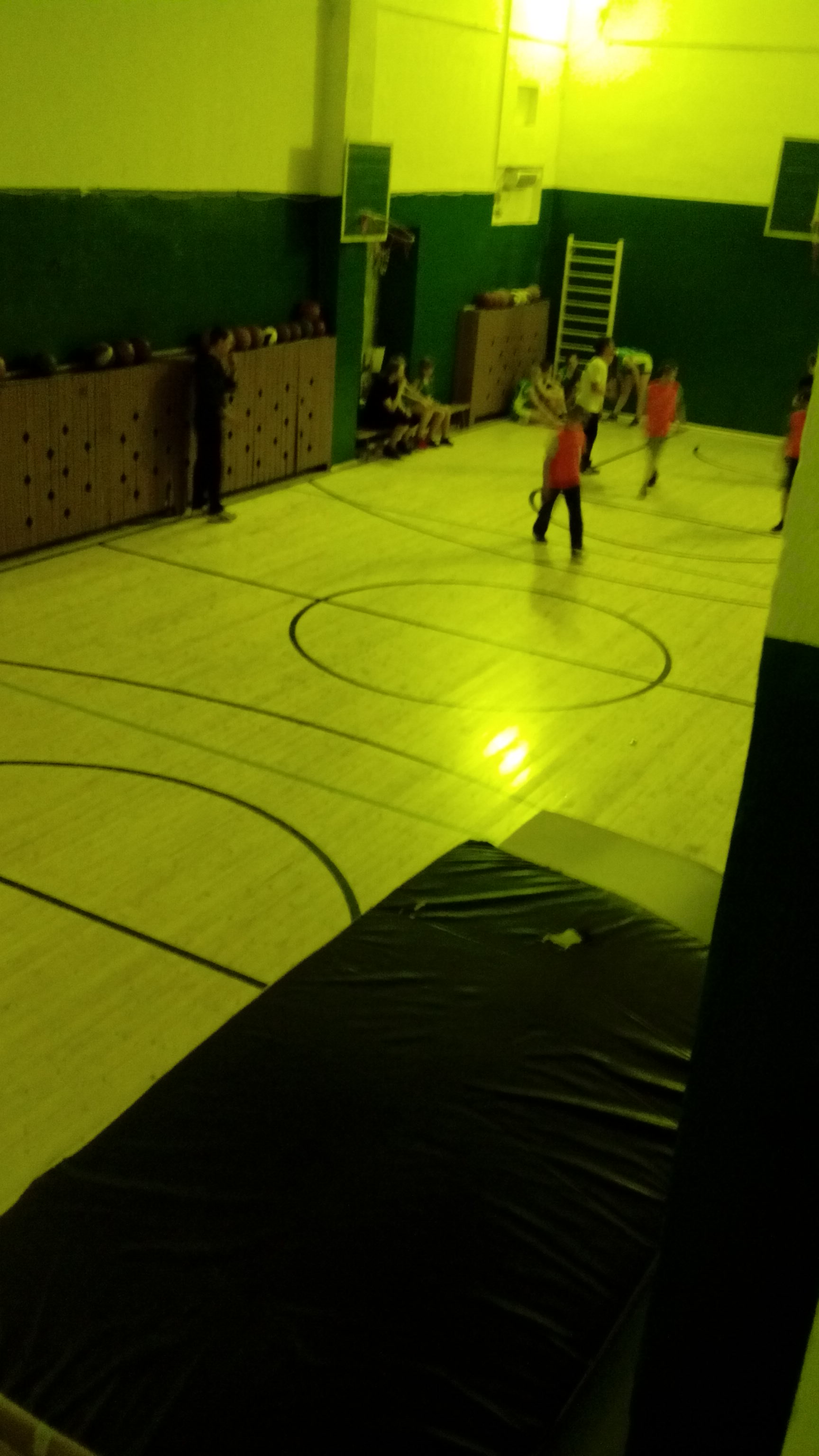 Спортивный зал ПСОШ